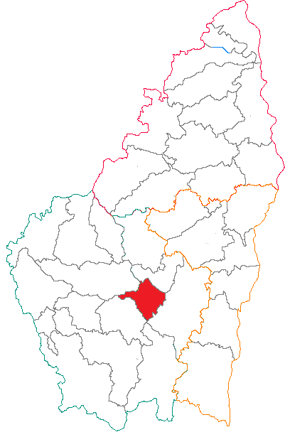 Situation du canton dans le département de l'Ardèche (France)